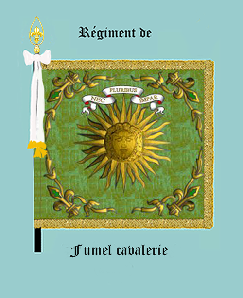 Standarte des Kavallerieregiments „de Fumel“ Königreich Frankreich